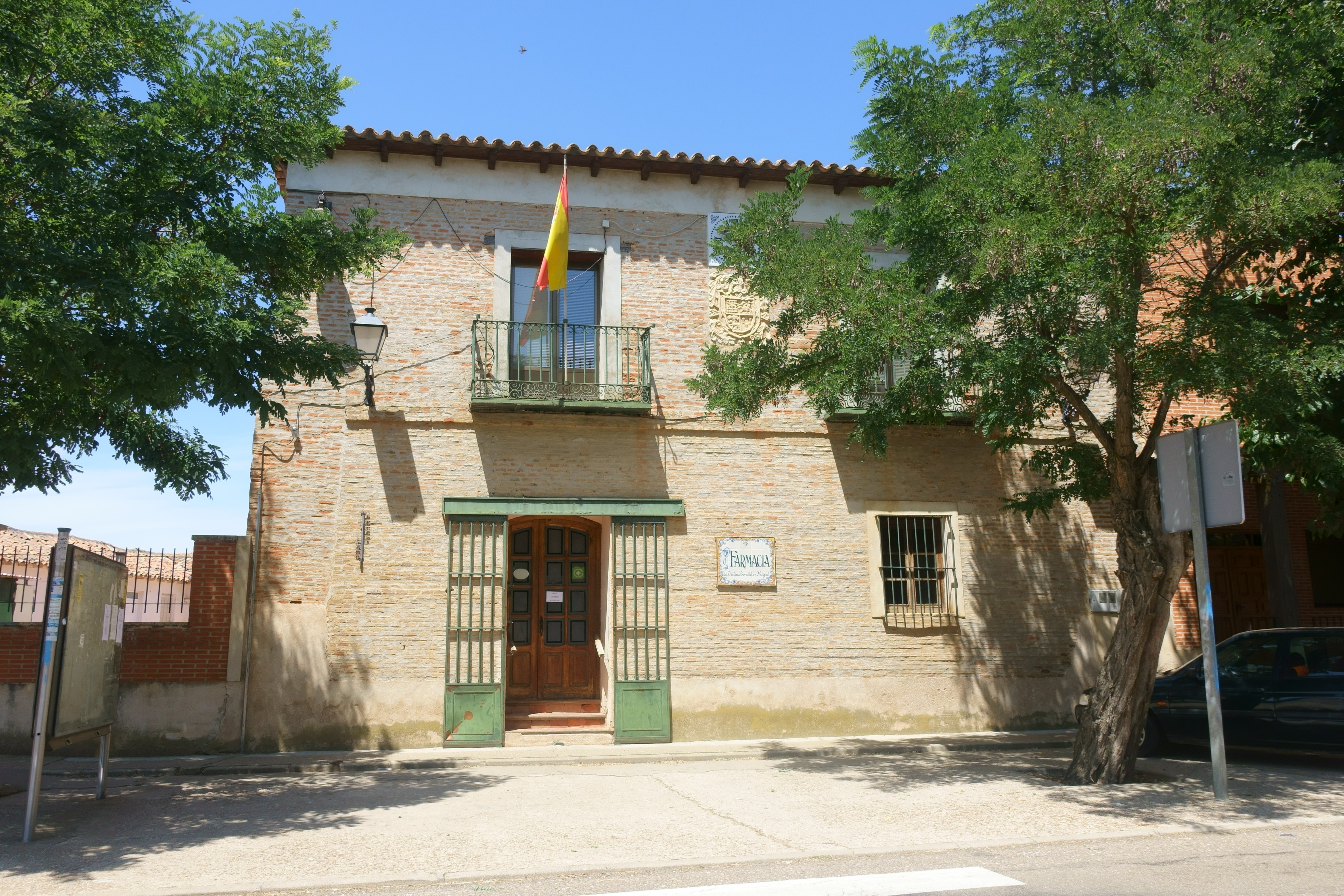 Casa consistorial de Villafrechós (Valladolid, España).